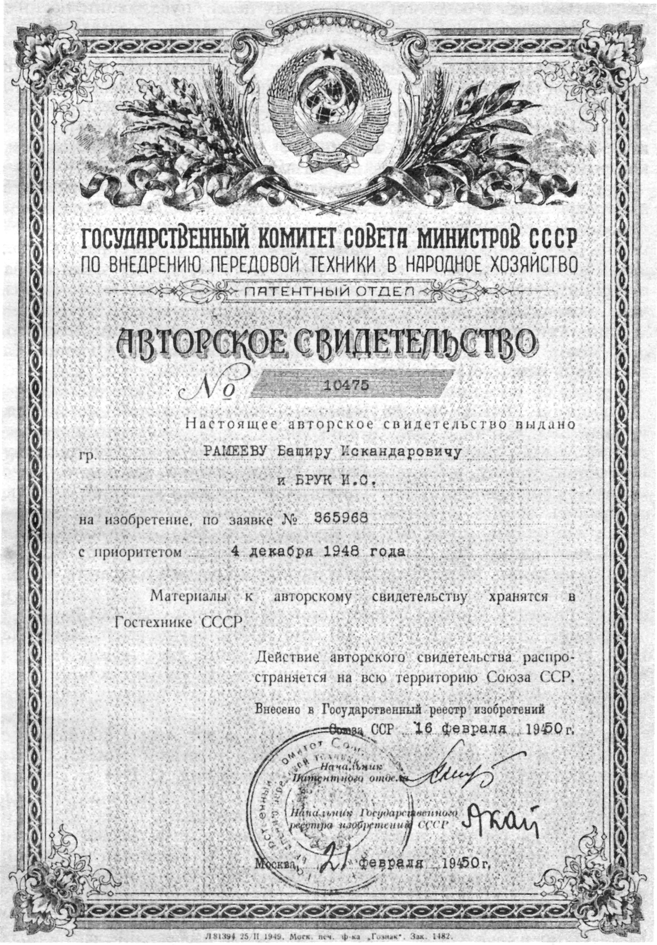 Авторское свидетельство №10475 выданное Б.И.Рамееву и И.С.Бруку